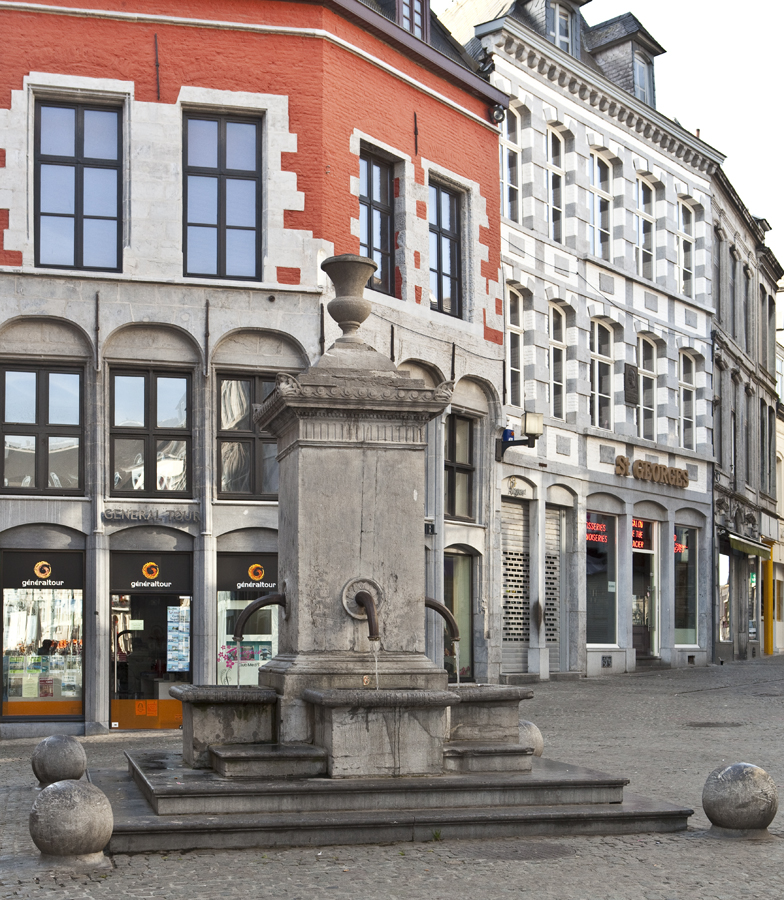 Le Rouge-Puits, fontaine à Mons.